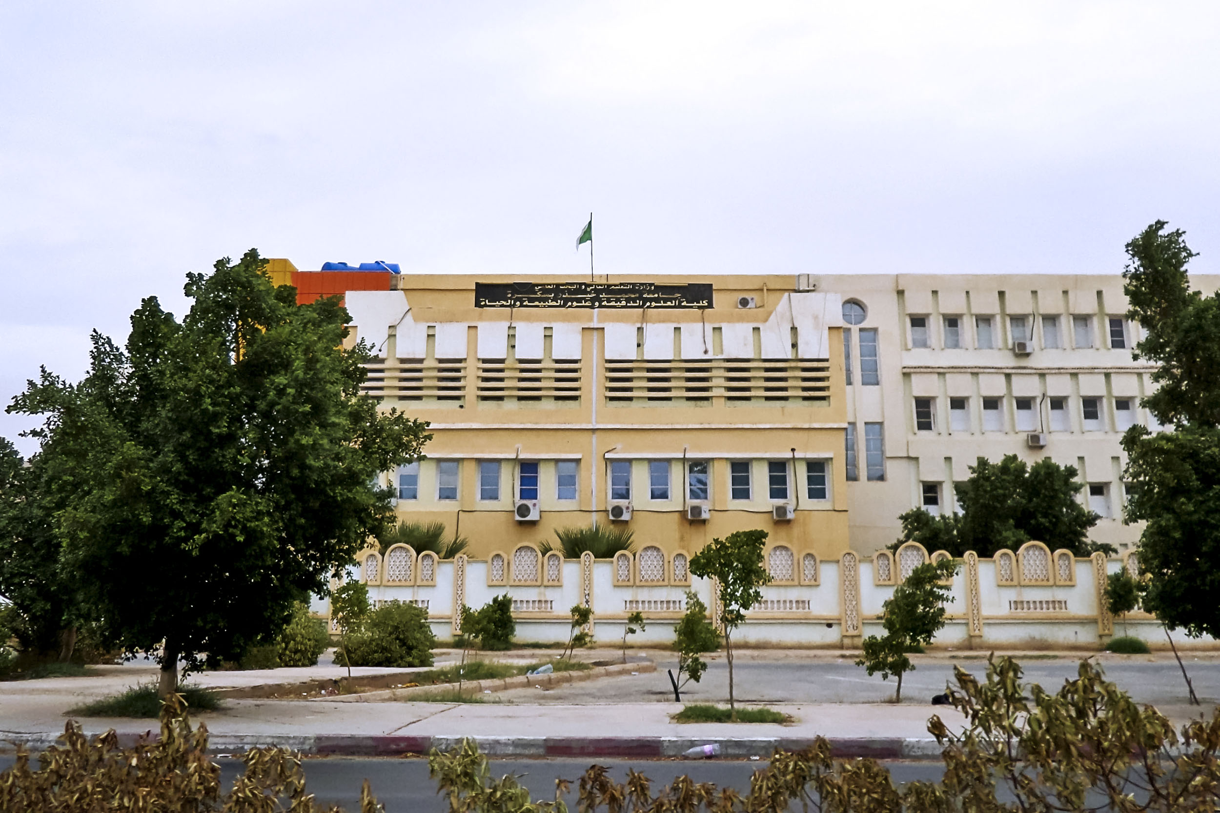 El Hadjeb, l'université الجامعة